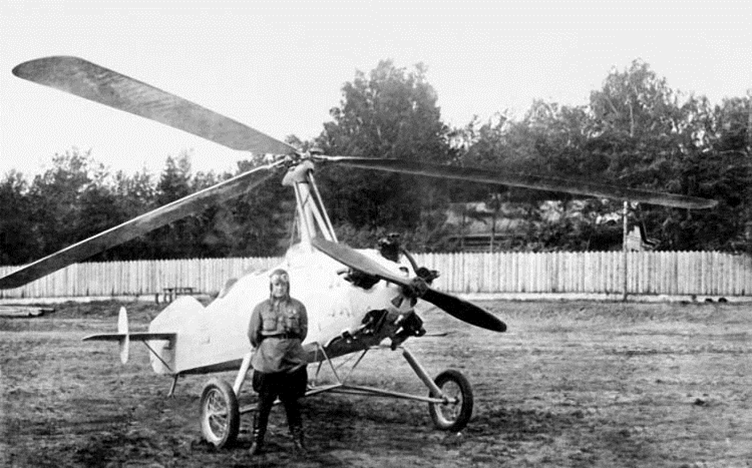 Это фотография человека умершего в 1943 году. Кошиц Д. А. сфотографирован на фоне автожира А-14 в 1935 году. Автор фотографии не известен.